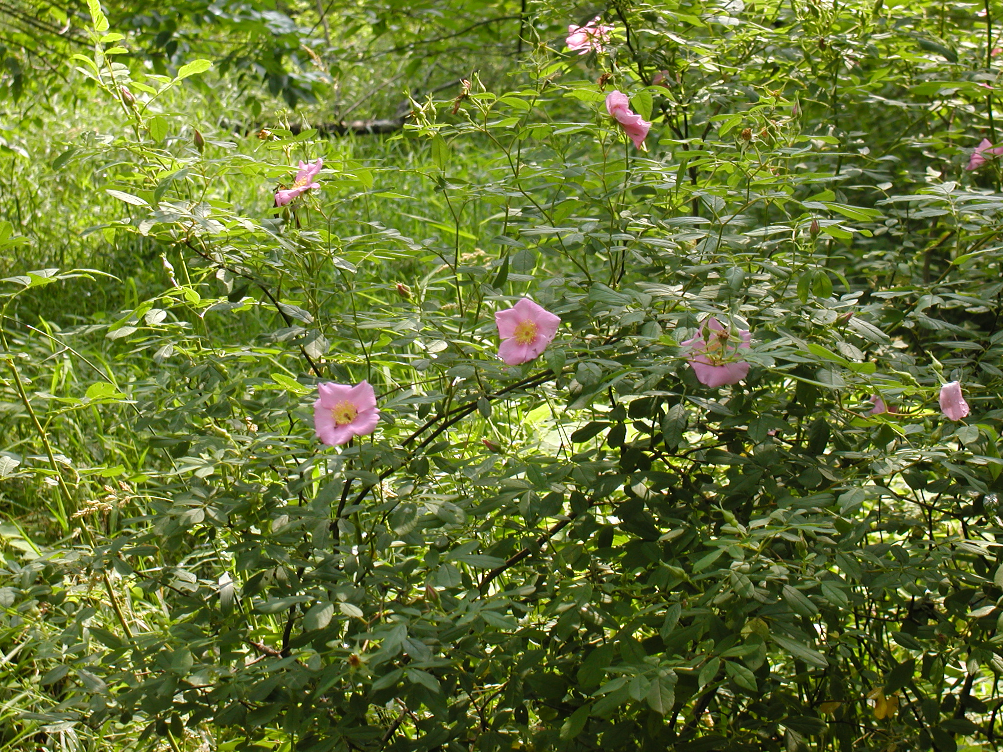 Rosa palustris